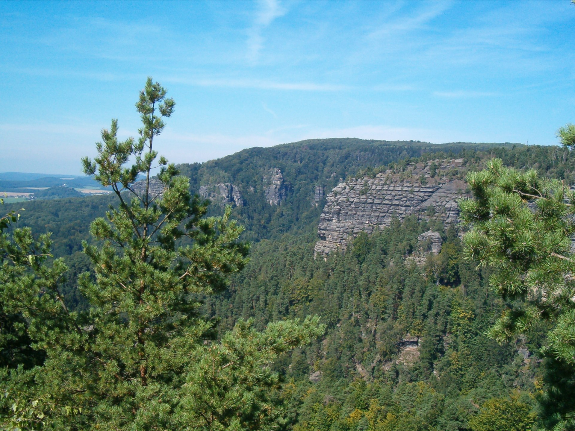 České Švýcarsko - Pravčická brána